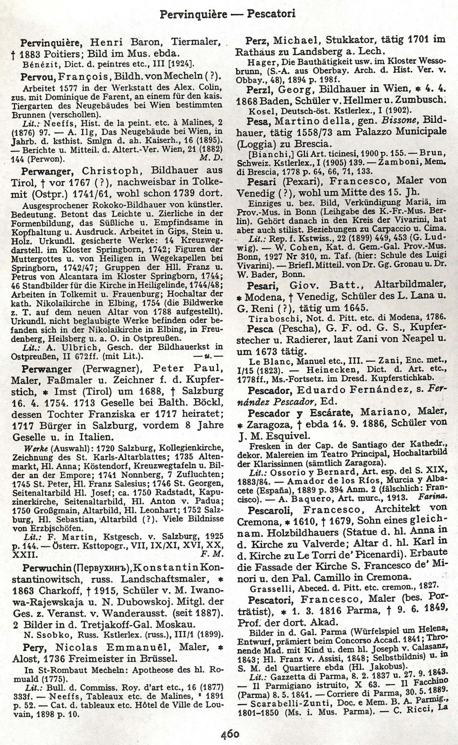 Perwanger, Christoph (aus Ulrich Thieme, Felix Becker, Allgemeines Lexikon der Bildenden Künstler von der Antike bis zur Gegenwart, S. 460).